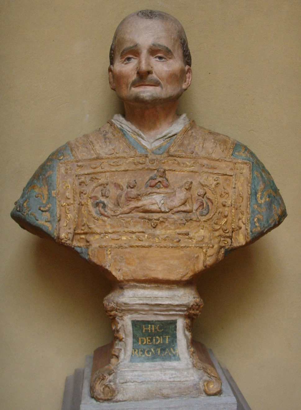 Chiostro dello scalzo, busto di sant'antonino